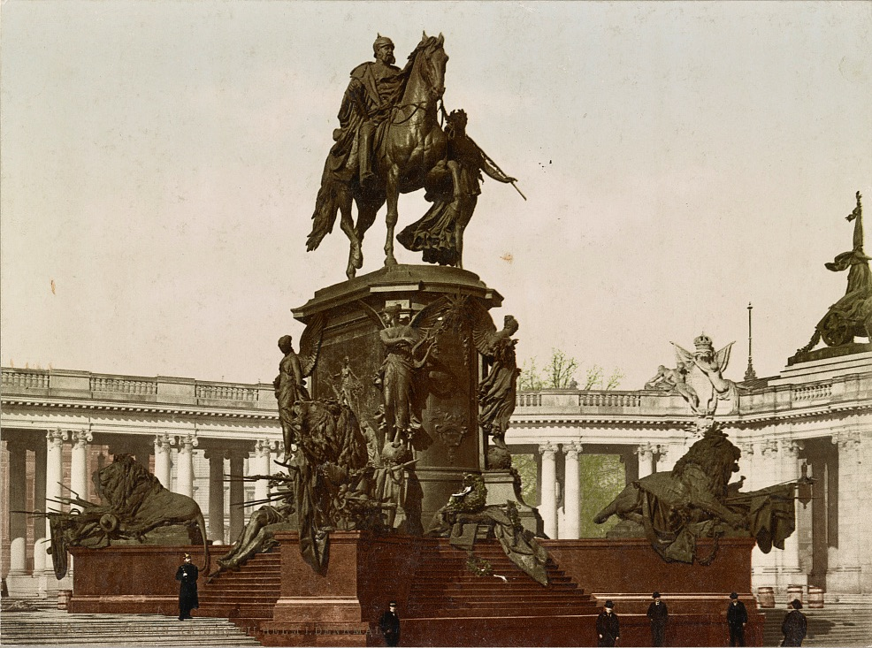 Berlin Denkmal Kaiser Wilhelm I um 1900